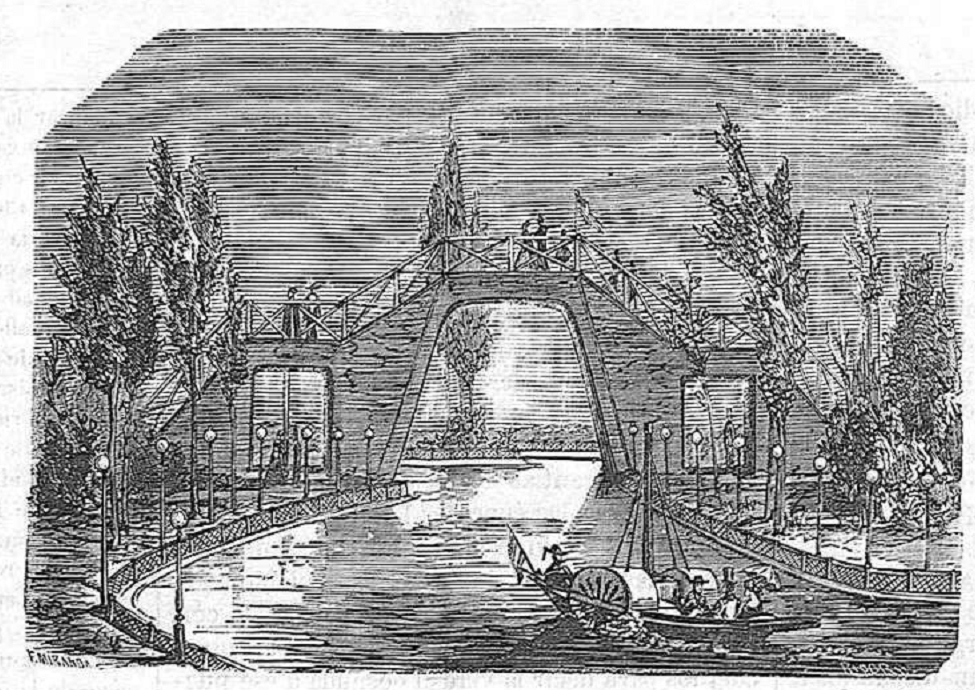 Los Campos Elíseos de Madrid, en la publicación española El Periódico Ilustrado.